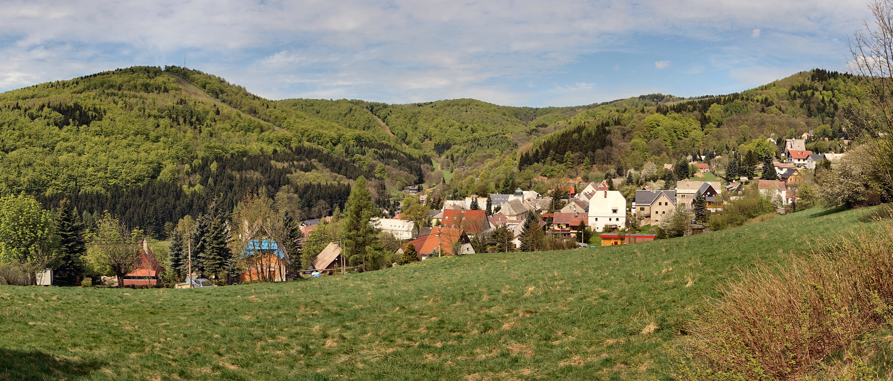 Pohled na obec Mikulov, v pozadí Bouřňák